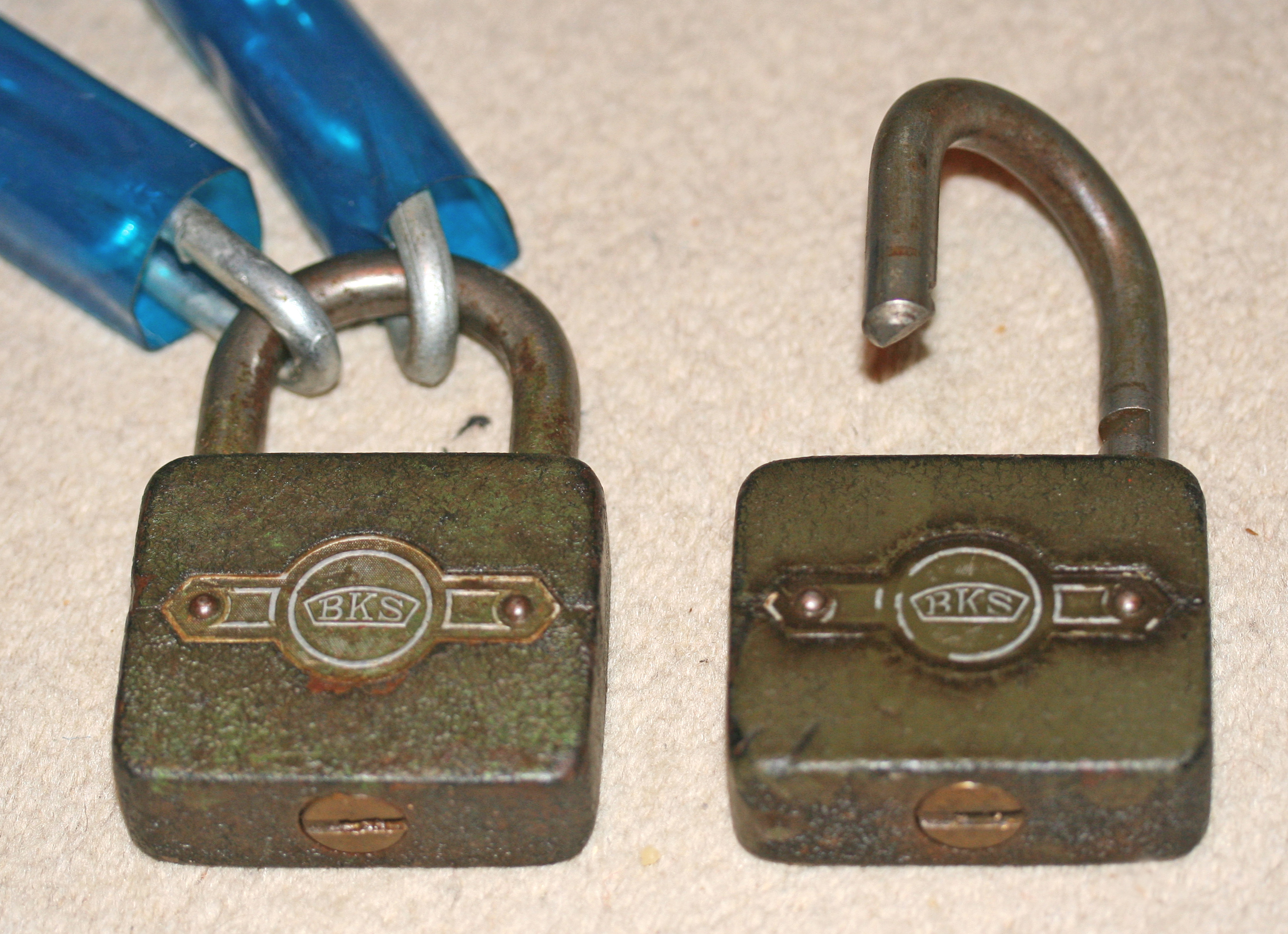 Klauschteren.